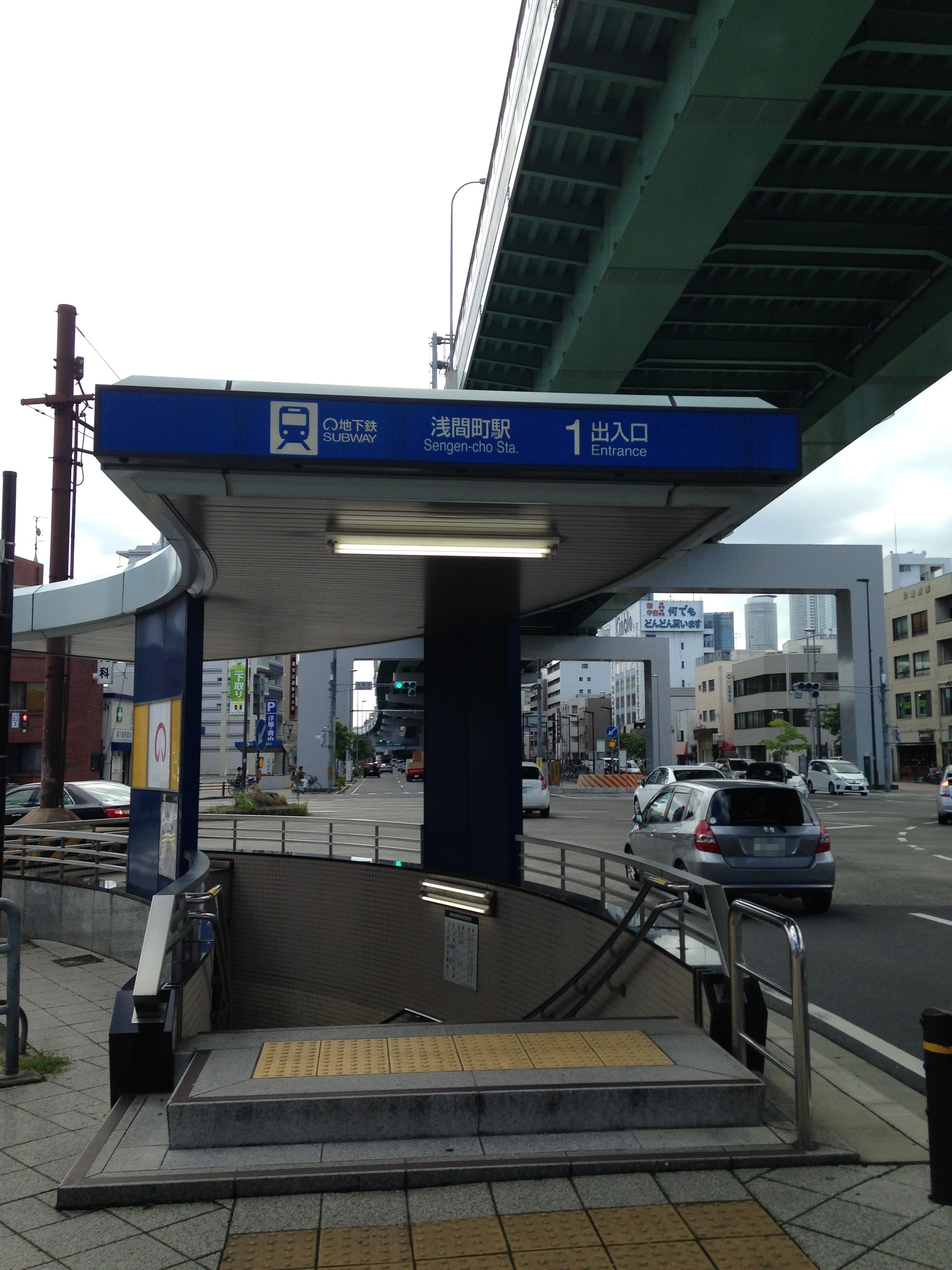 浅間町駅の1番出入り口